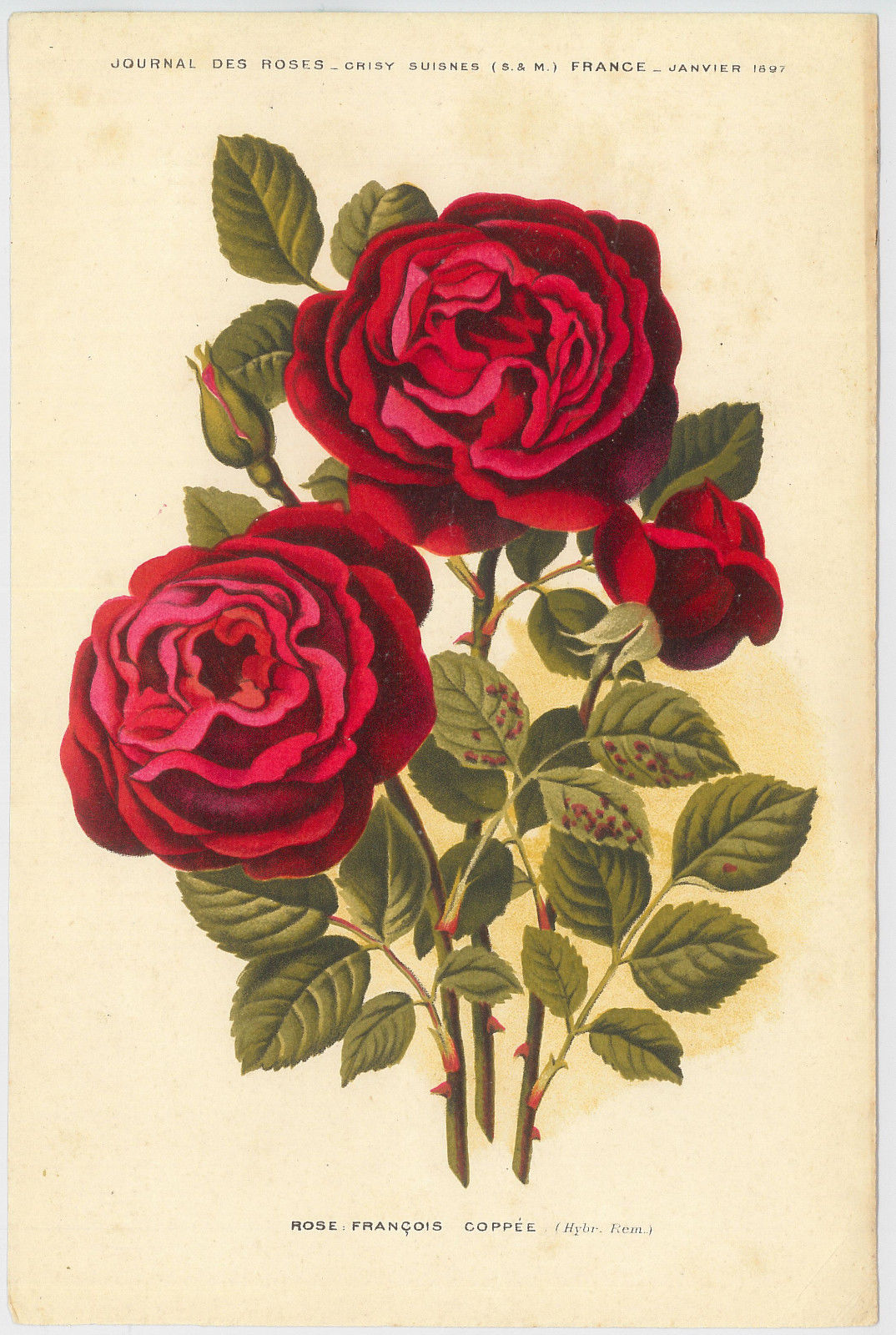 Rose hybride remontant 'François Coppée' (Veuve Lédéchaux 1895), in Journal des roses, janvier 1897.